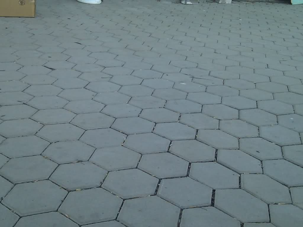 Южната страна на бул. Мария Луиза, локално платно, източен изход на метрото. София, България.